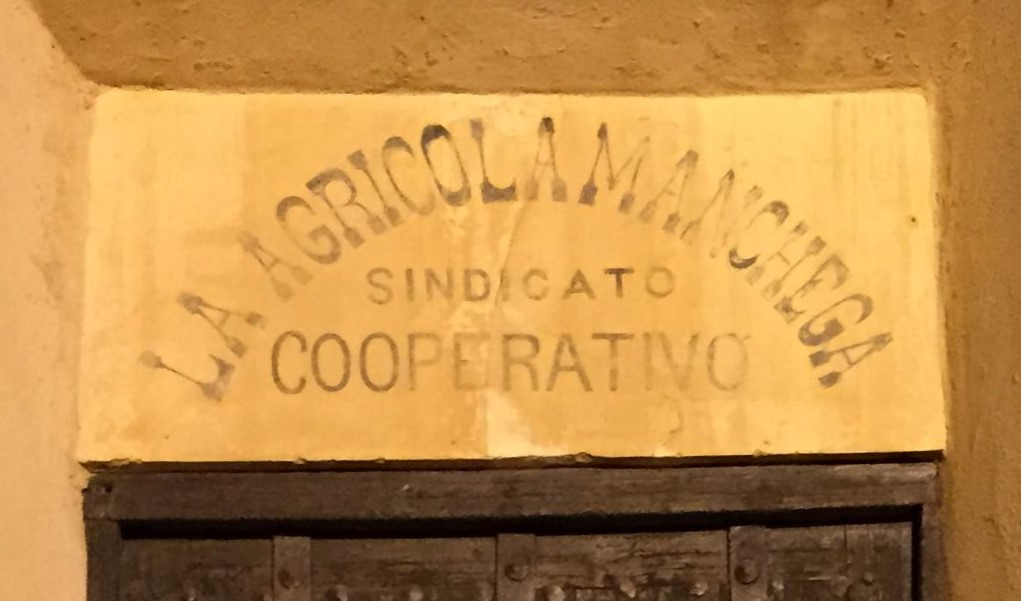 Cartel de La Agrícola Manchega